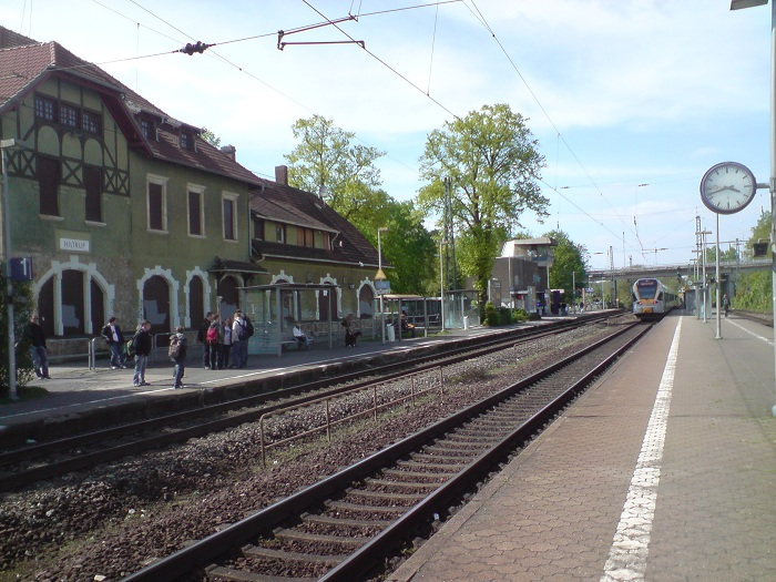 Bahnhof Münster-Hiltrup, Bahnsteige und Gleisanlagen. Blick Richtung Norden.